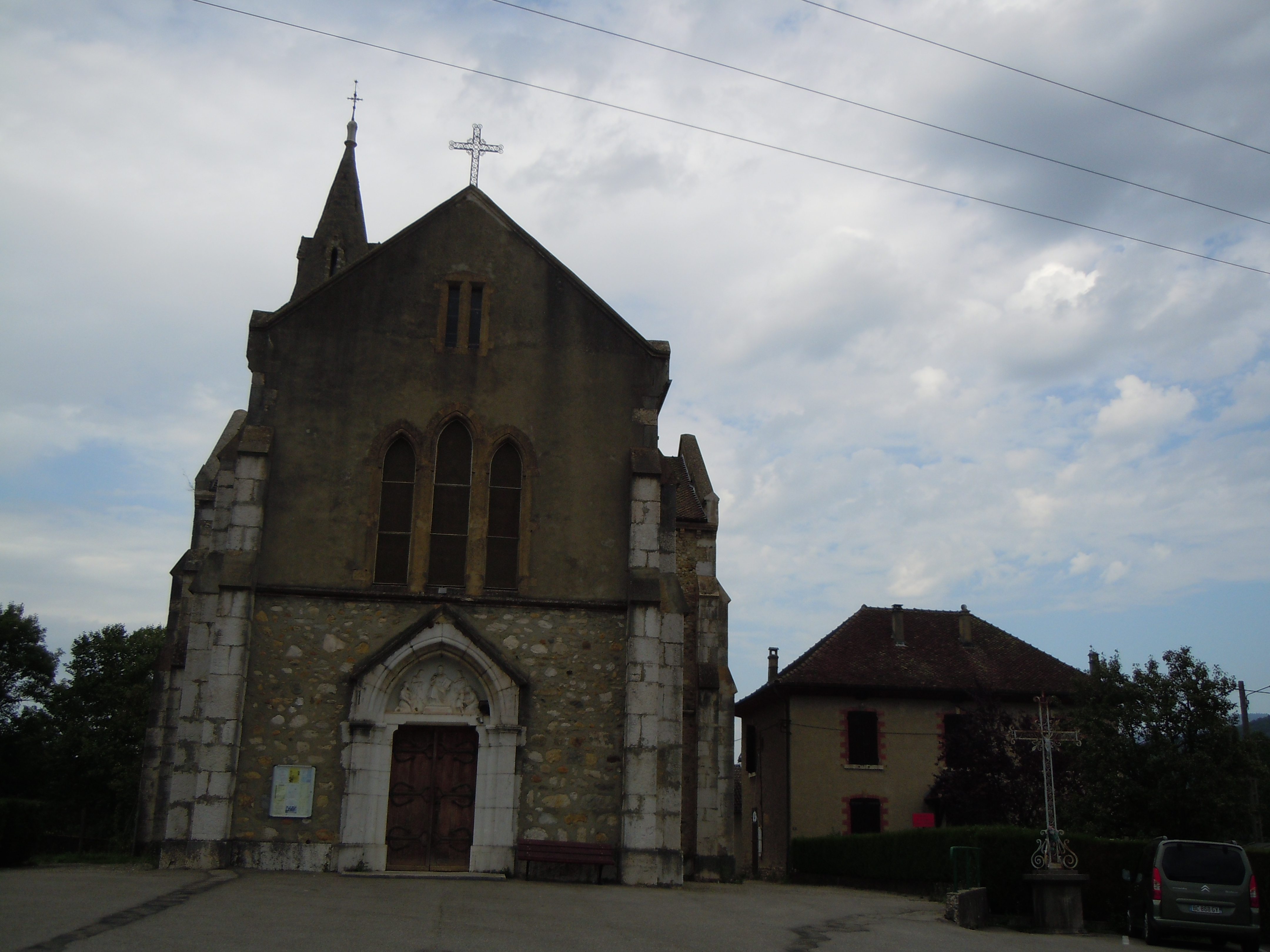 Façade de l'église de Saint-Bueil en Isère